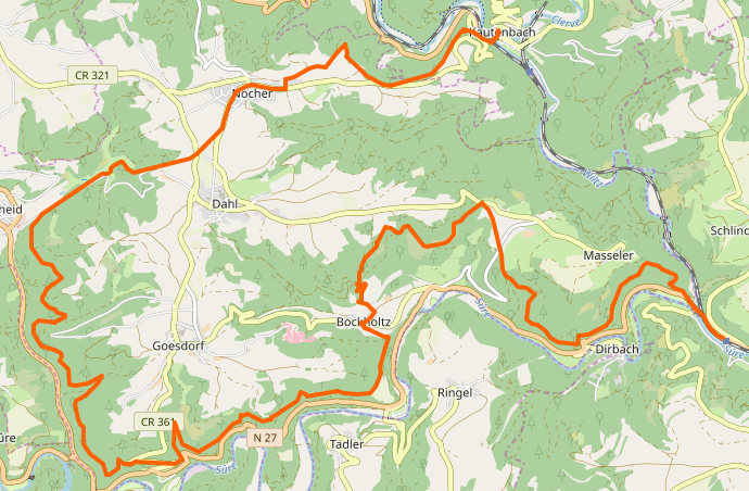 Streck vum Éislek-Pad